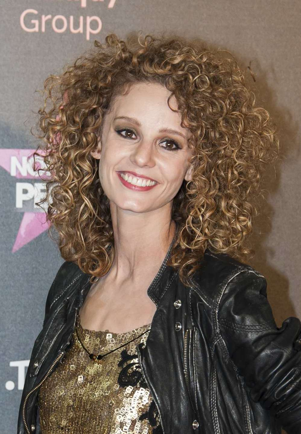 Fotos del photocall y fiesta de lanzamiento de un nuevo canal de televisión en España.